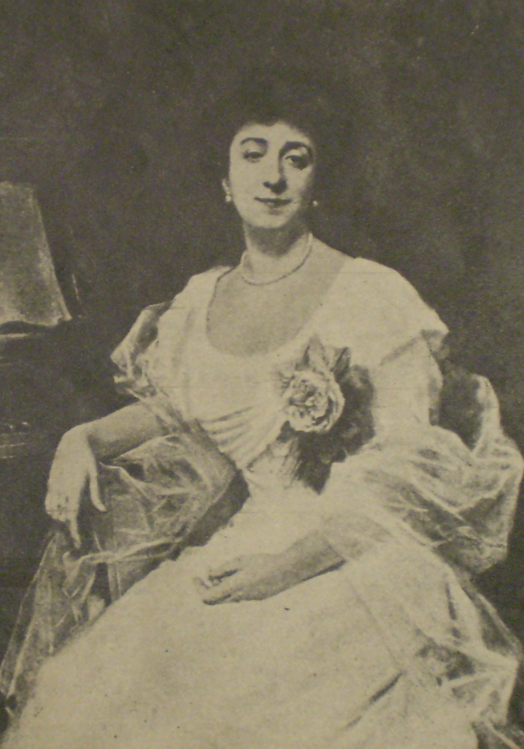 Regina Pacini, esposa de Marcelo T. de Alvear